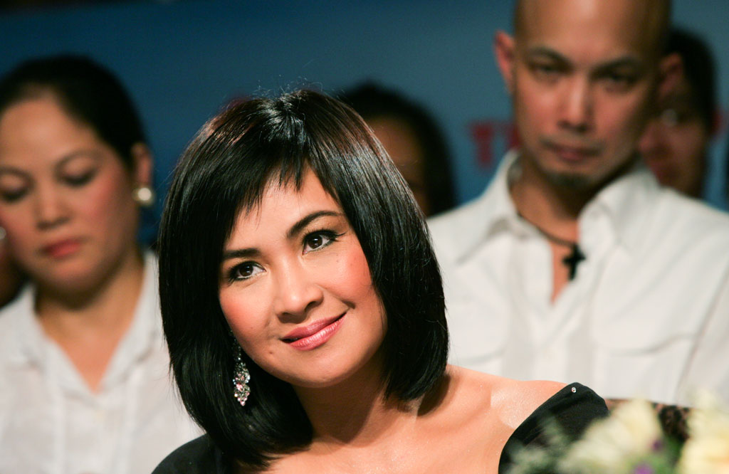 thích bạn này ghê lắm